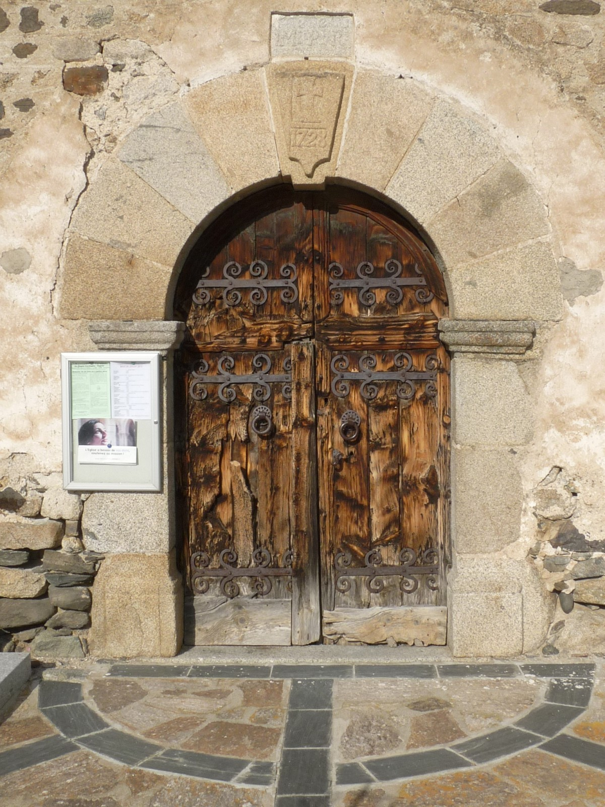 Eglise de Villeneuve, Angoustrine-Villeneuve-des-Escaldes, P.O., France